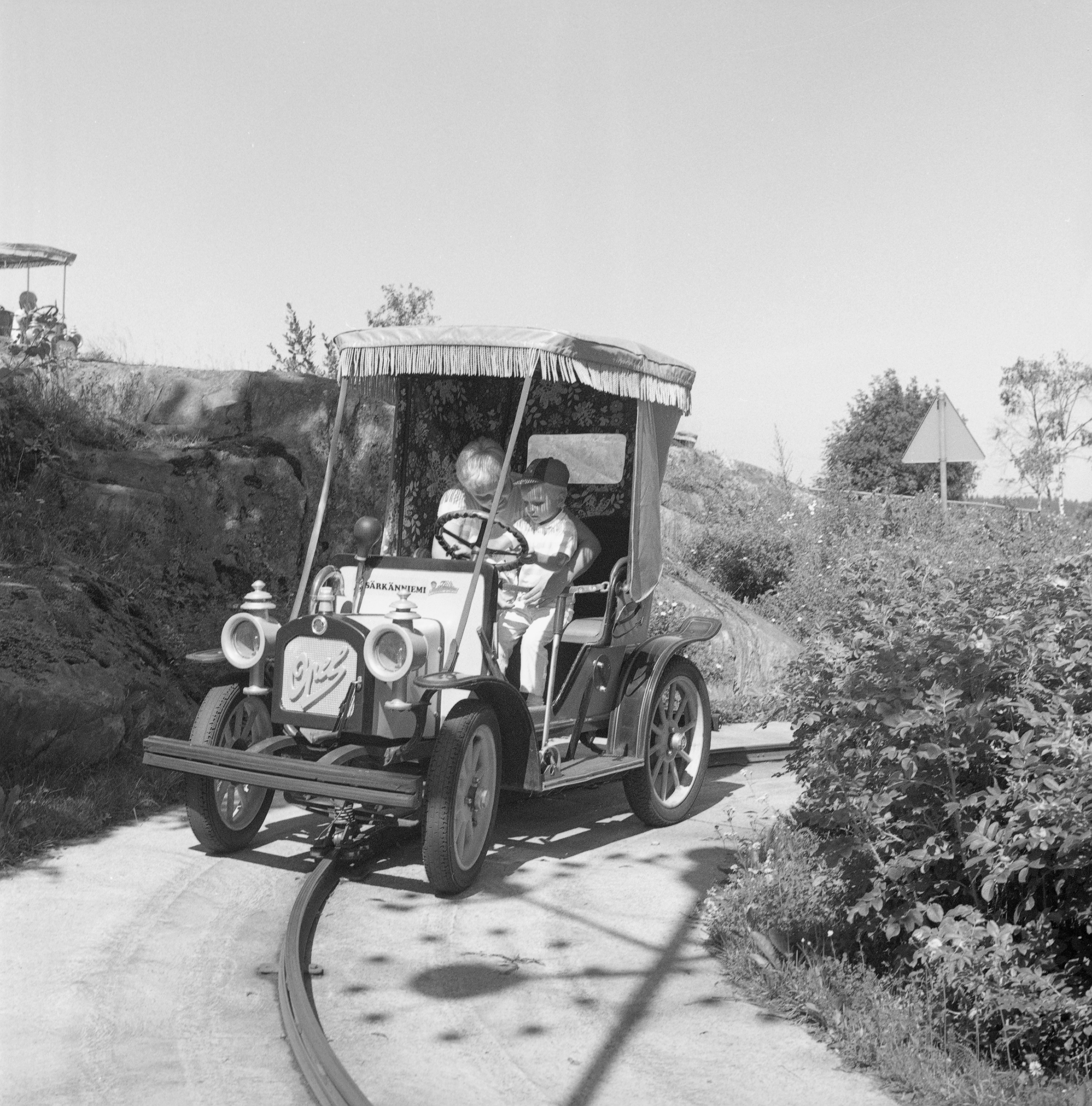 ”Kantti × kantti” -niminen huvipuistolaite Särkänniemessä Tampereella